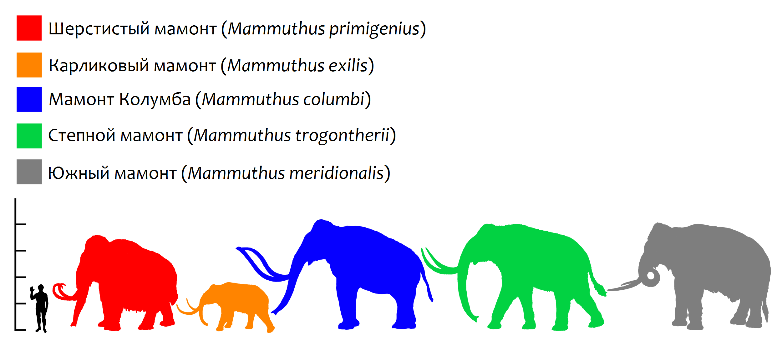 Сравнительные размеры некоторых видов мамонтов. Шерстистый мамонт (3,4 м), карликовый мамонт (1,8 м), мамонт Колумба, степной мамонт и южный мамонт (4 м).